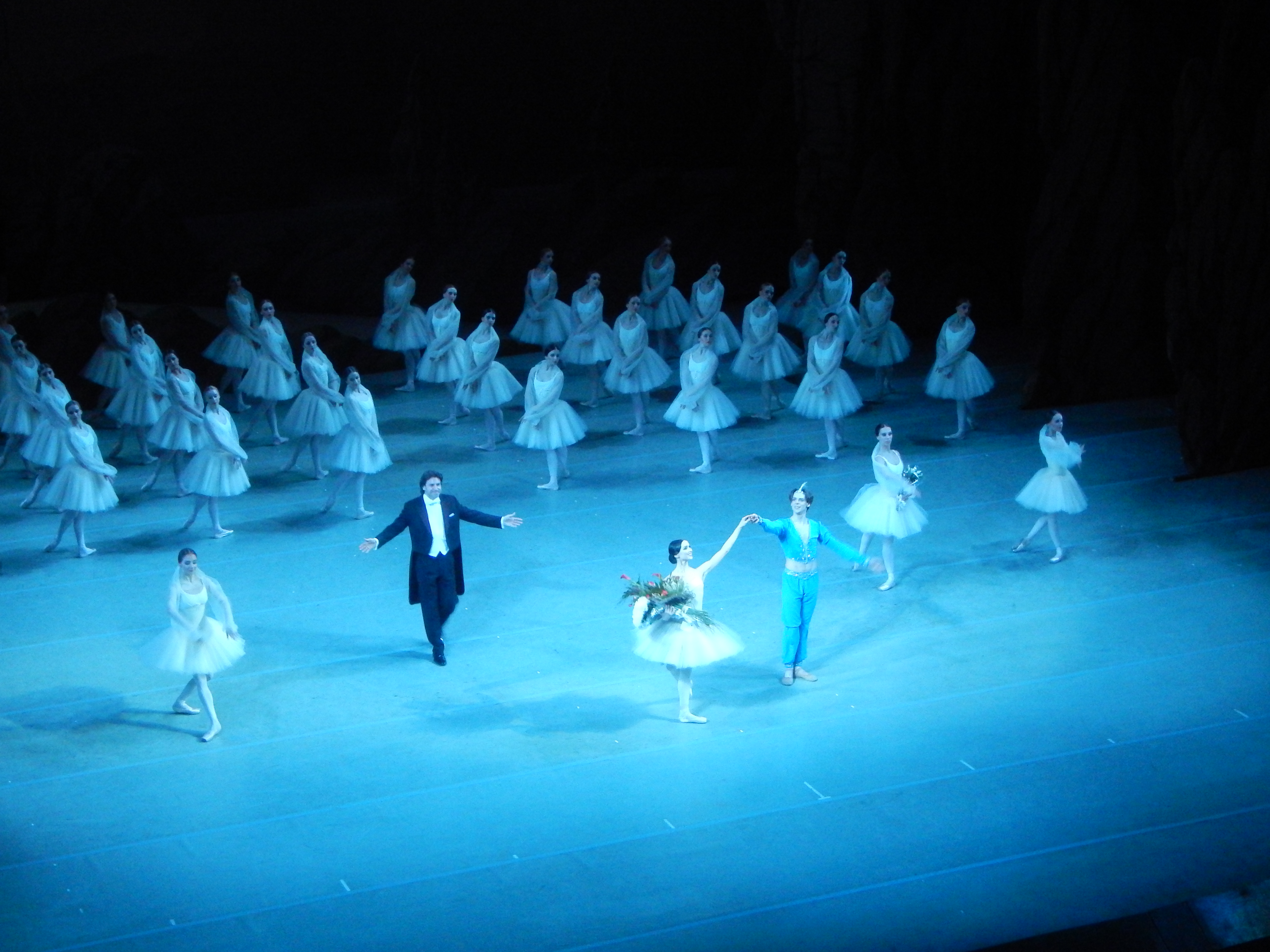 Мариинский театр, балет «Баядерка», 18 мая 2017 Окончание спектакля